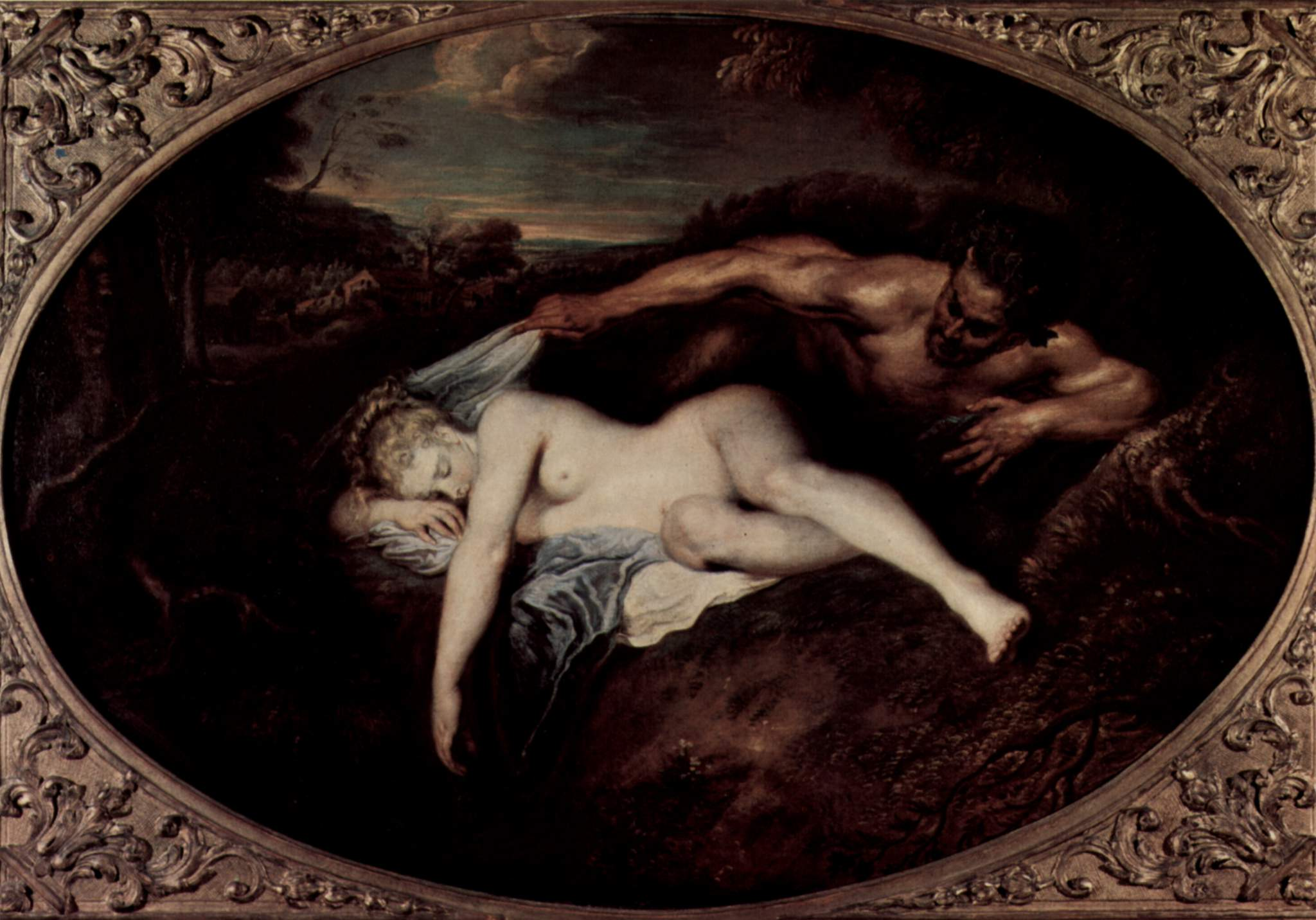 Nymph and Satyr.